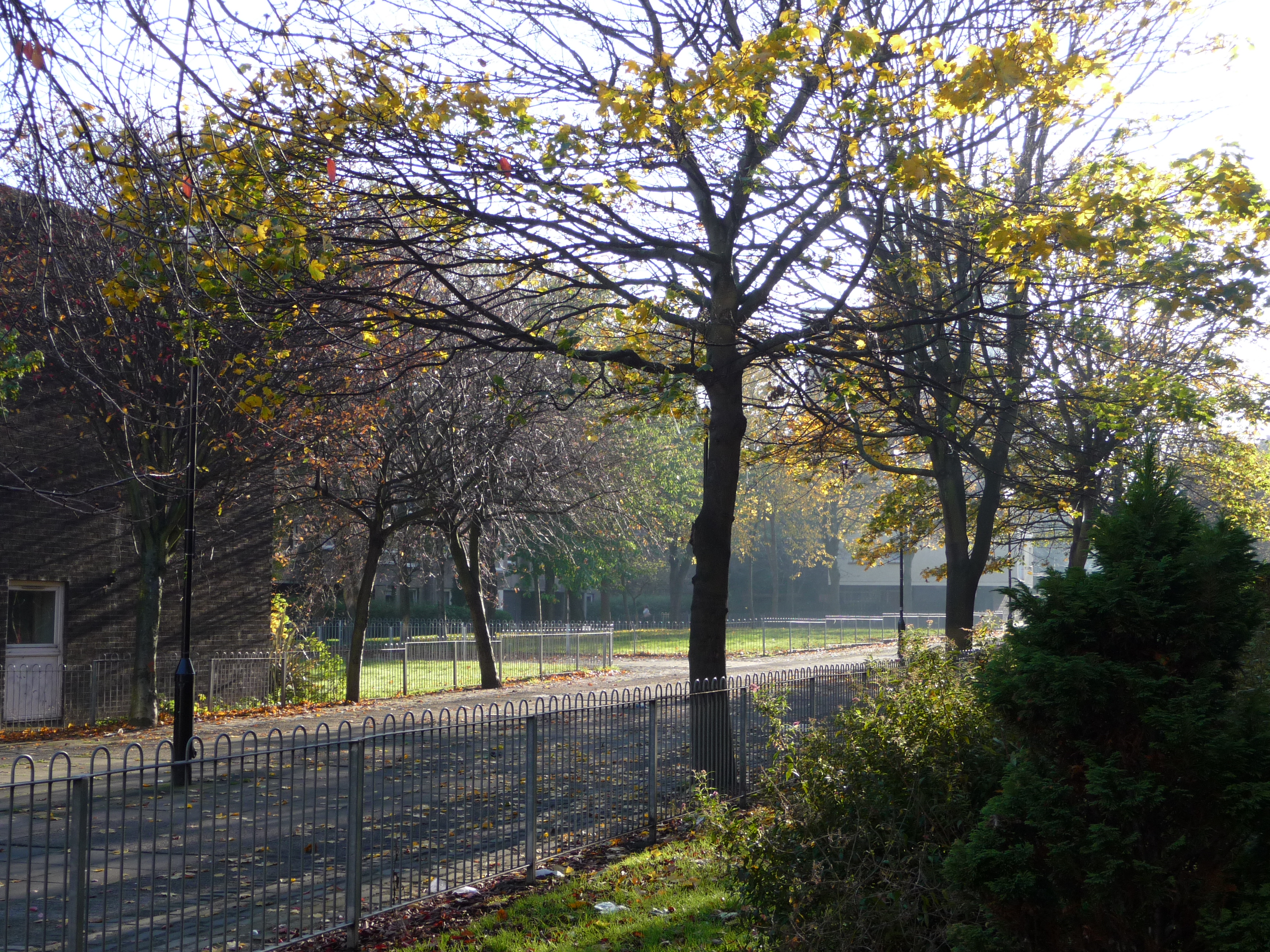 Kirkgate, Leith Nov 2011